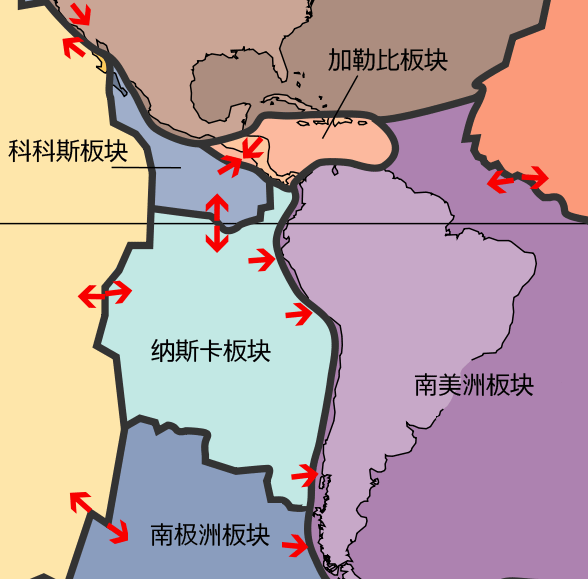 地震发生处纳斯卡板块潜没于向西移动的南美洲板块之下